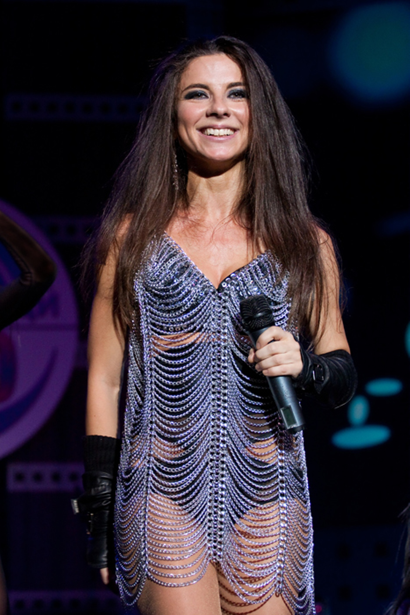 Группа Винтаж. Анна Плетнева